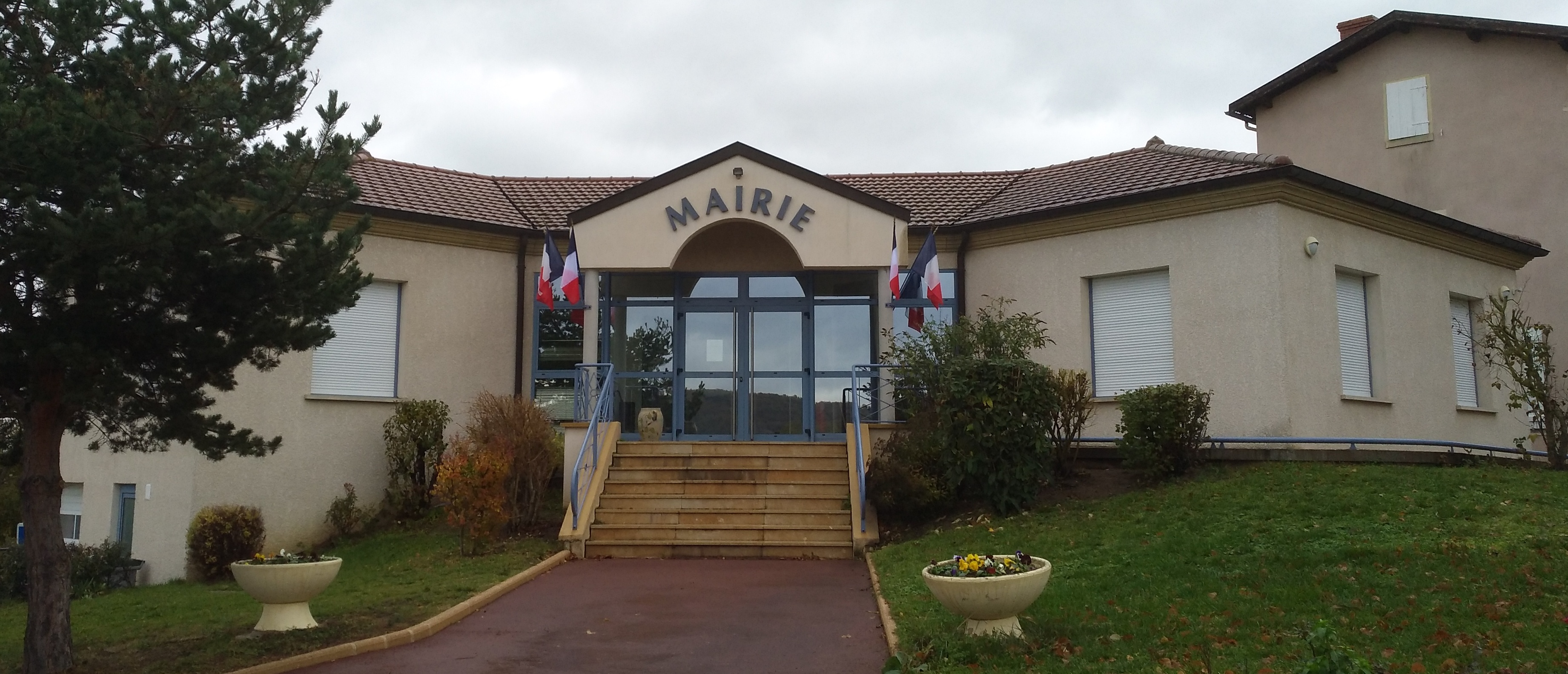 Mairie de Neaux (Loire, France).